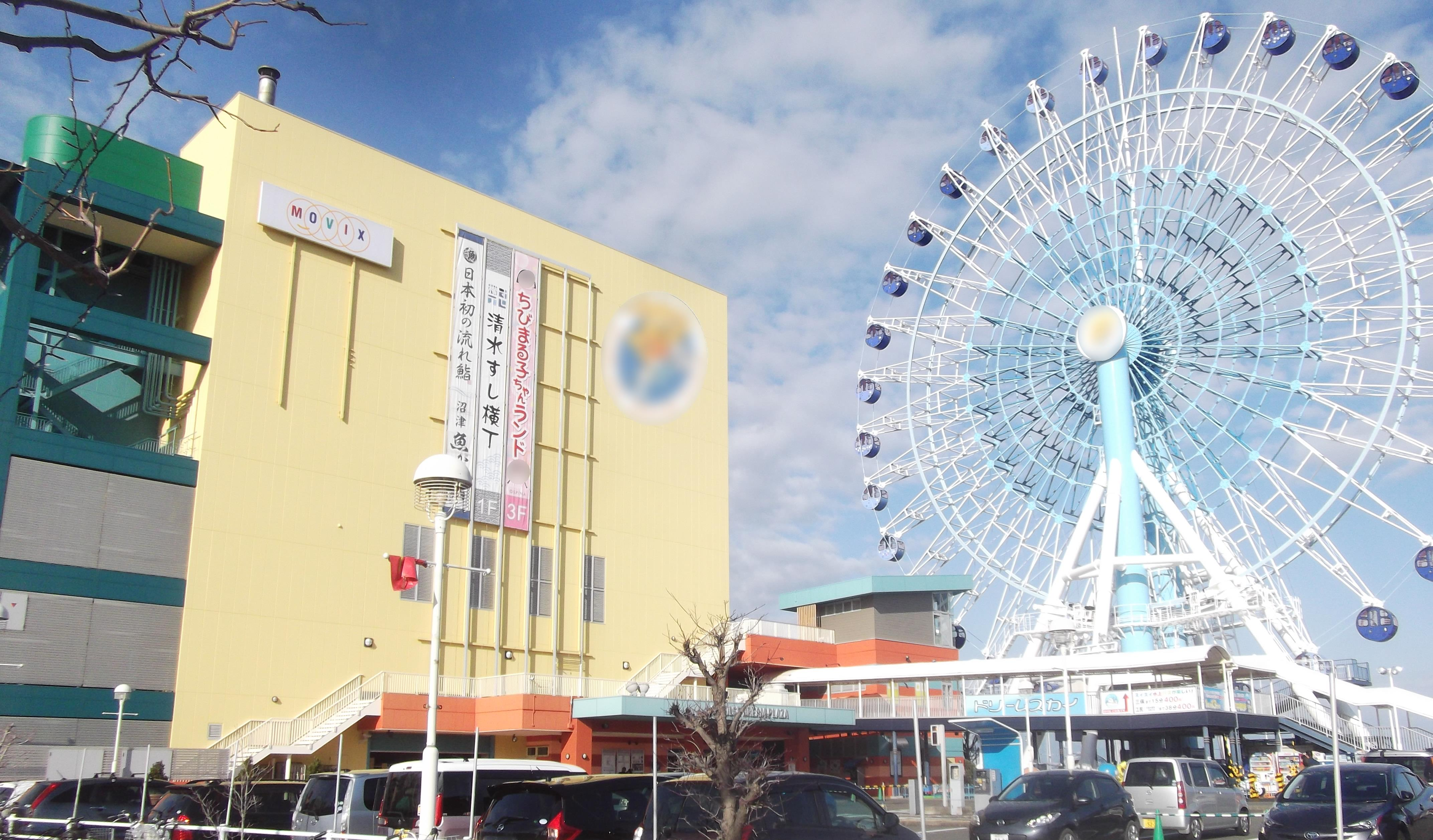 エスパルスドリームプラザと観覧車。南側から撮影。